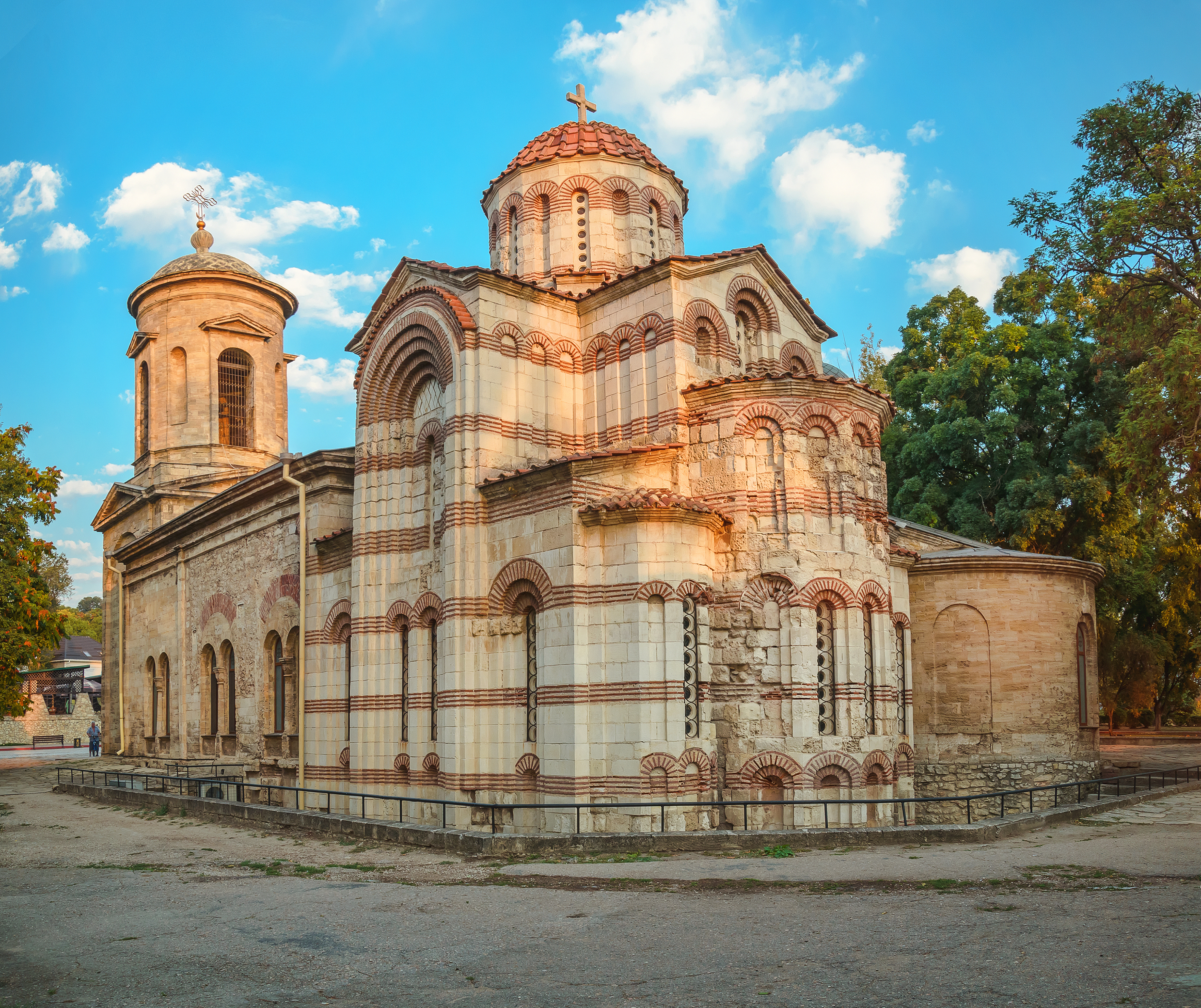 Церковь Иоанна Предтечи, VIII-Х вв.: улица Димитрова, 3, литер "А", Керчь, Крым This object is located on the Crimean Peninsula and recognized as cultural heritage by both Russia and Ukraine under the monument ID: 8230424000/ 01-112-0017, respectively. The legal status of the Crimean region is currently disputed.